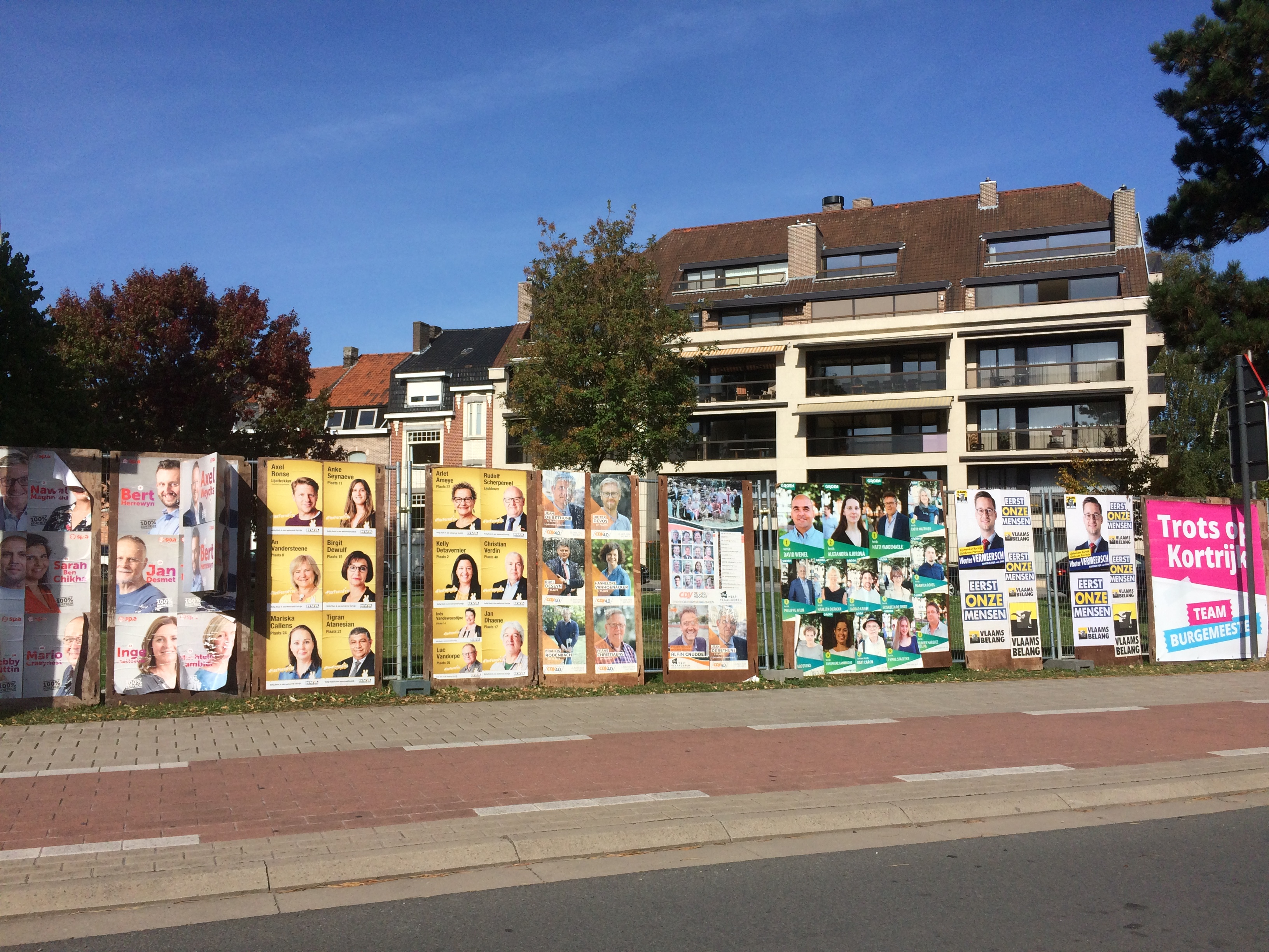 Reclame voor kandidaten voor de Belgische lokale verkiezingen 2018 in Kortrijk